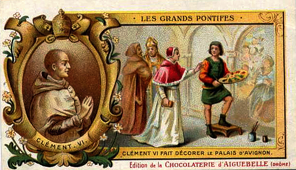 Clément VI pub chocolat d'Aiguebelle